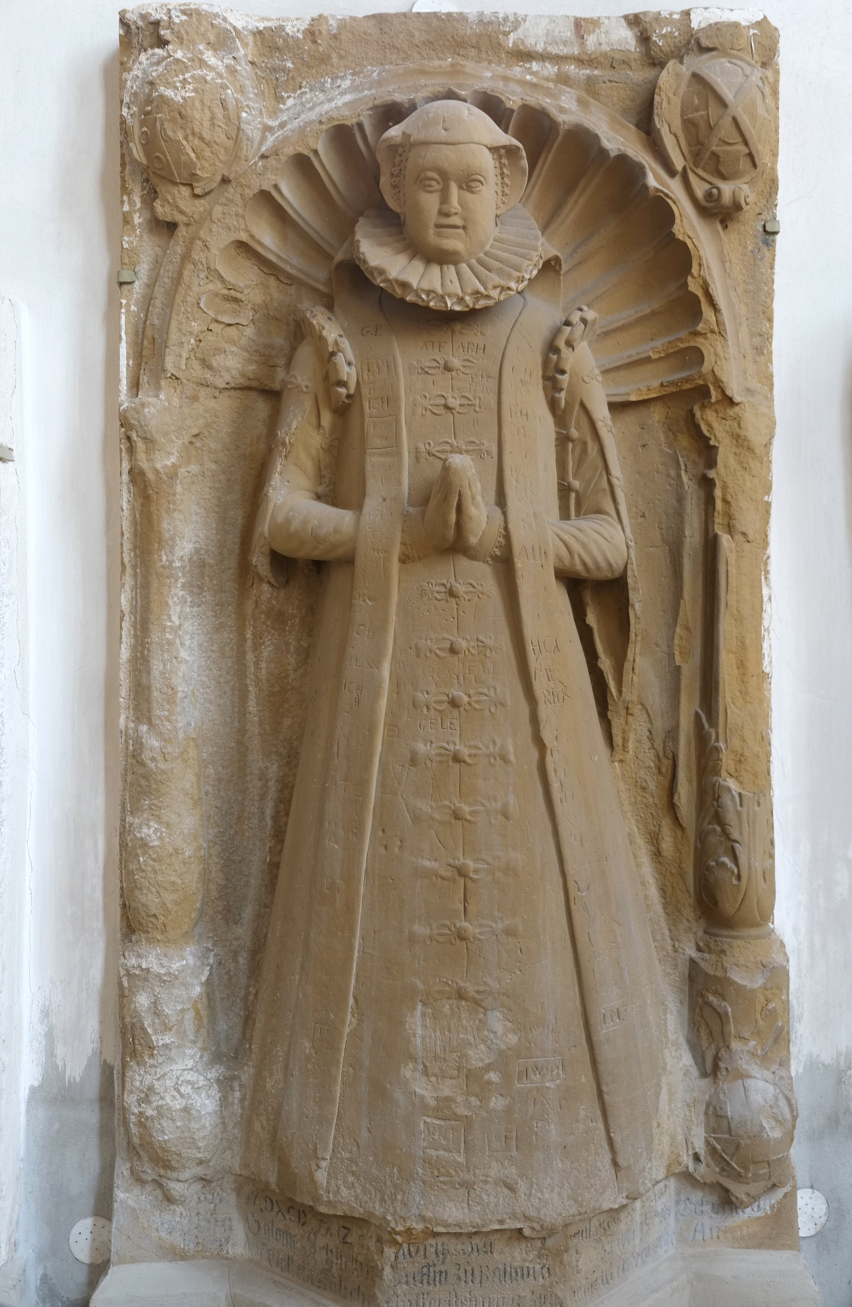 Evangelische Kirche St. Jakob in Oettingen in Bayern (Bayern), Grabmal der Gräfin Salome Schlick zu Passano, geb. Gräfin zu Oettingen-Oettingen, an der Ostwand des Chores